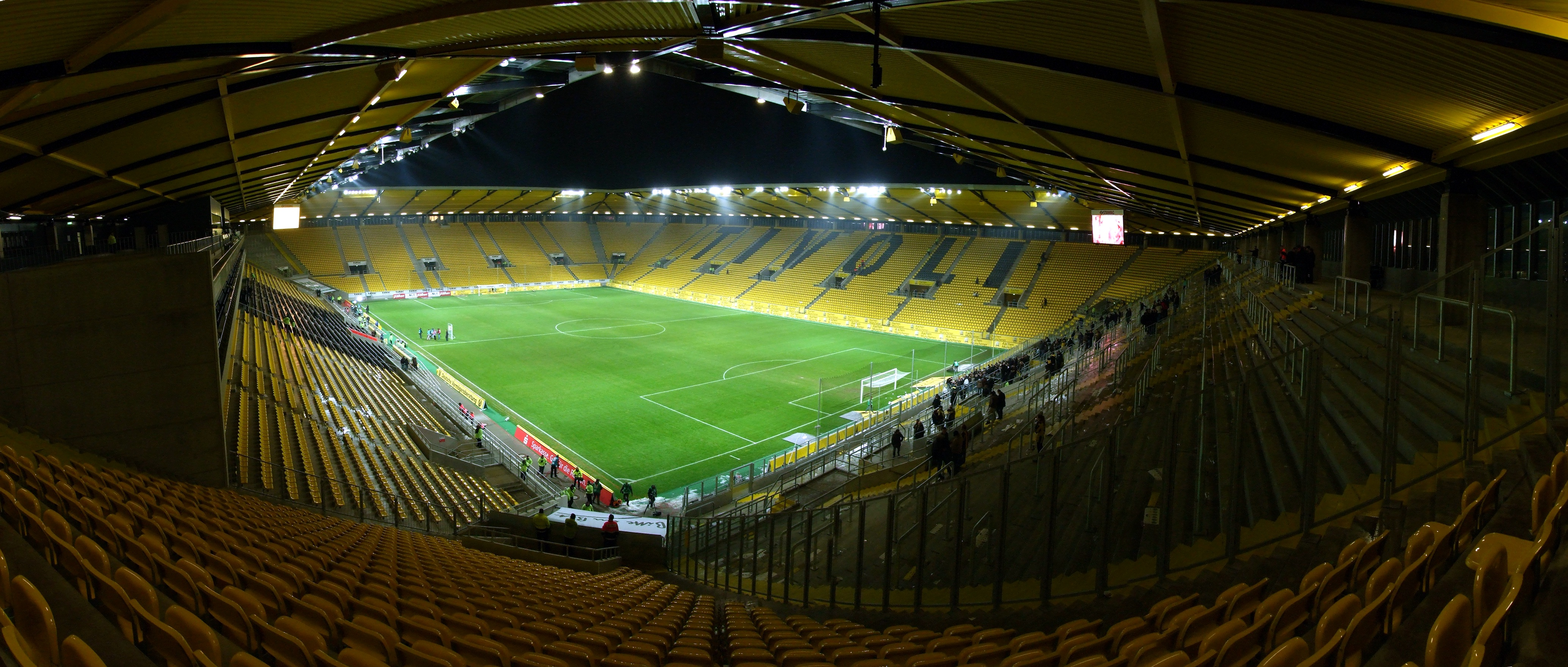 Der Neue Tivoli in Aachen von innen.